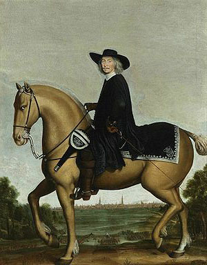 Portret van Bernhard von Galen, bisschop van Munster te paard met op de achtergrond de stad Groningen (1674) Wolfgang Heimbach.